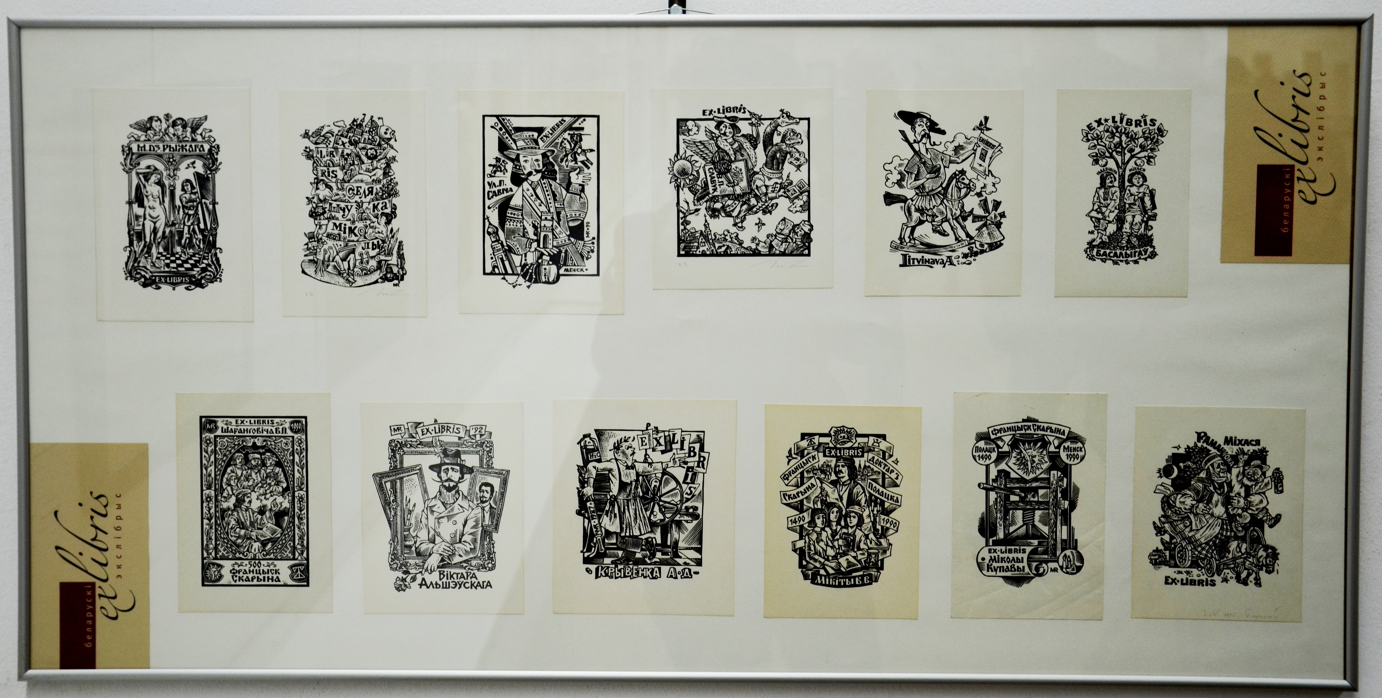 Белорусский экслибрис Миколы Рыжего с 1987 по 1997 годы. Минск, Дворец Искусств, вернисаж 23.10.2014